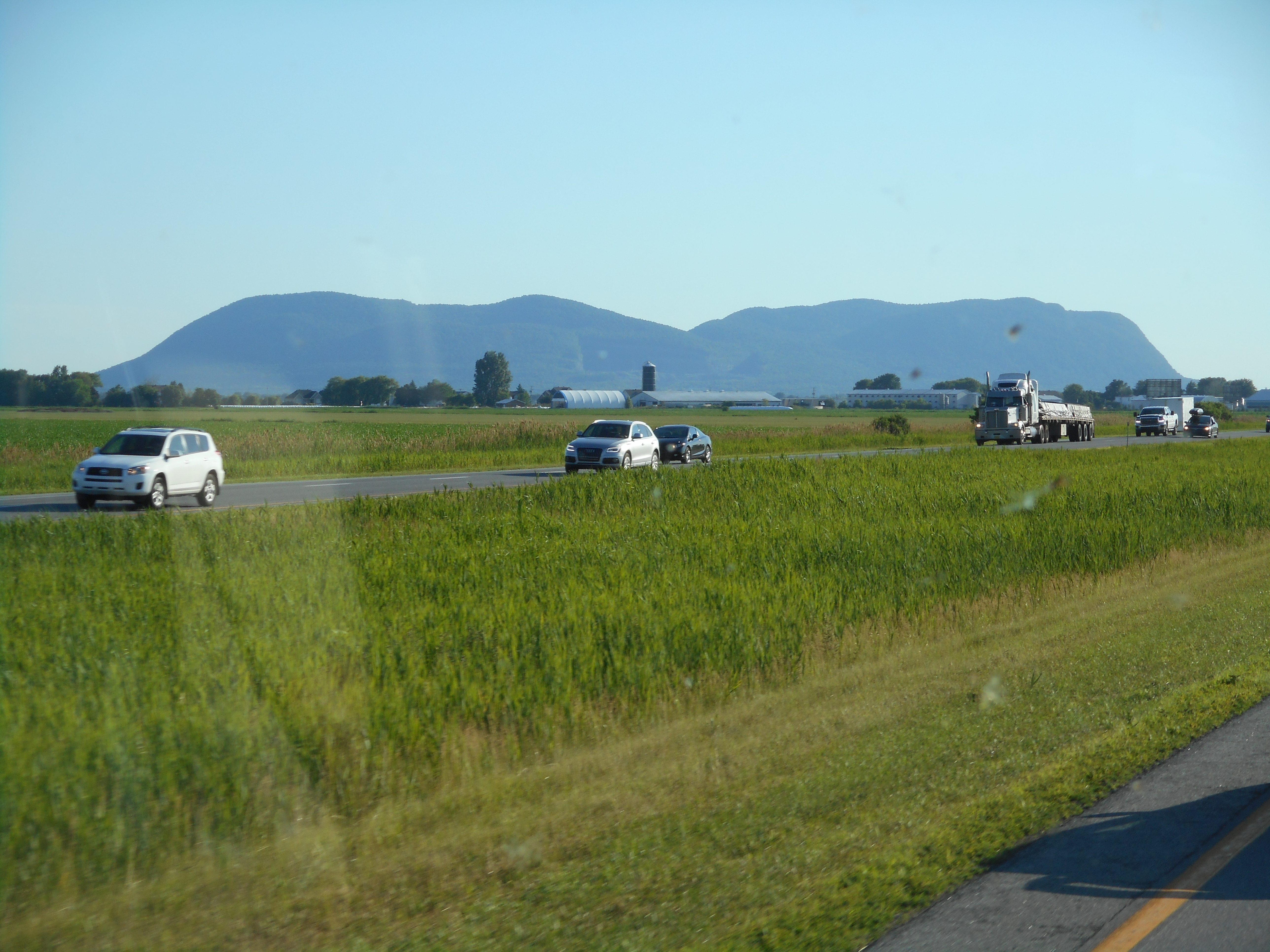 Mont Saint-Hilaire, vu de l'autoroute 20